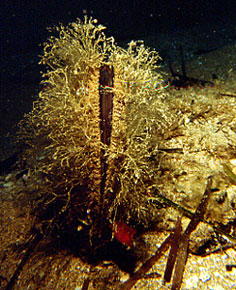 Pinna nobilis